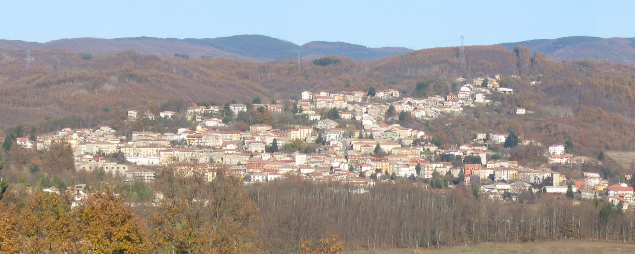 Autore: F.chiodo. Panorama di Soveria Mannelli scattata in Adami il 24 novembre 2006.